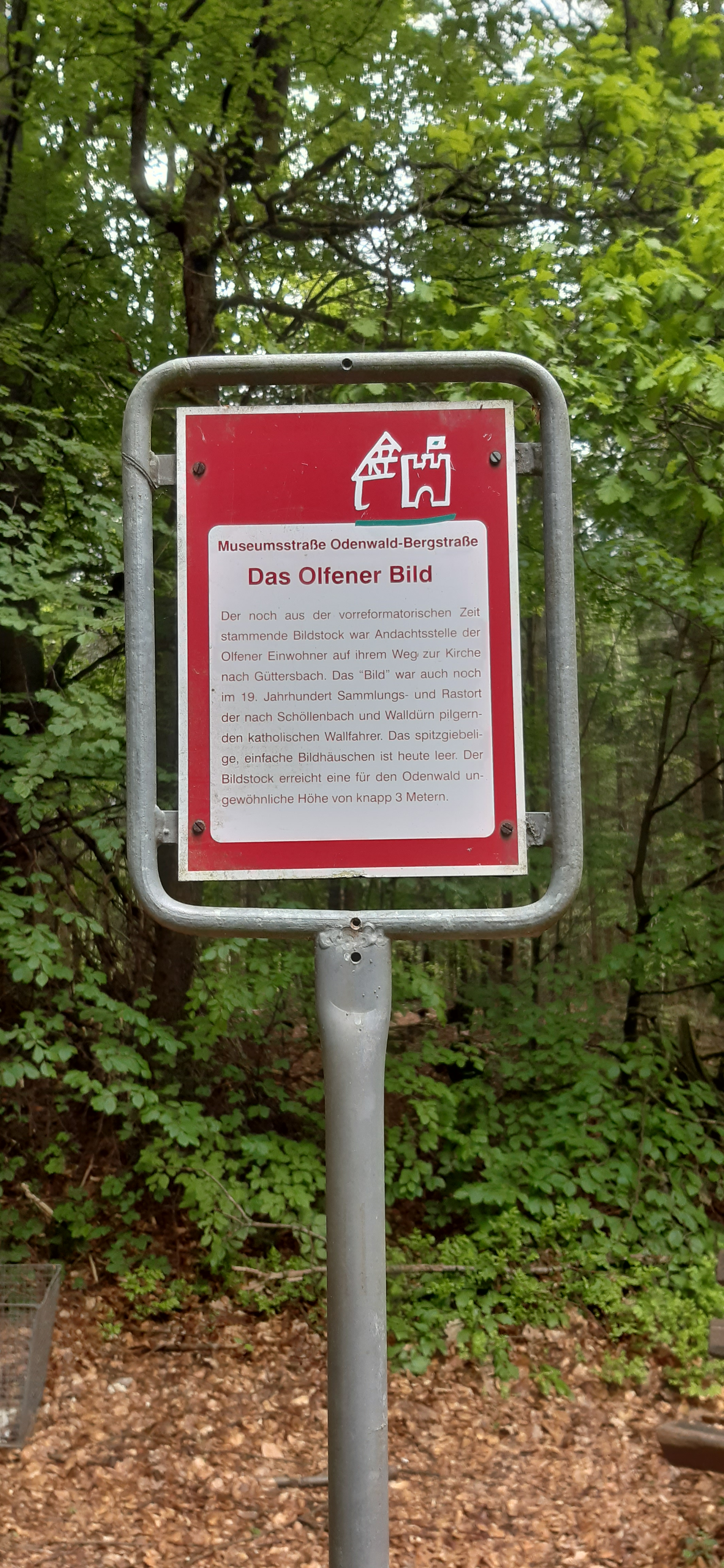 Infotafel zum Olfener Bild